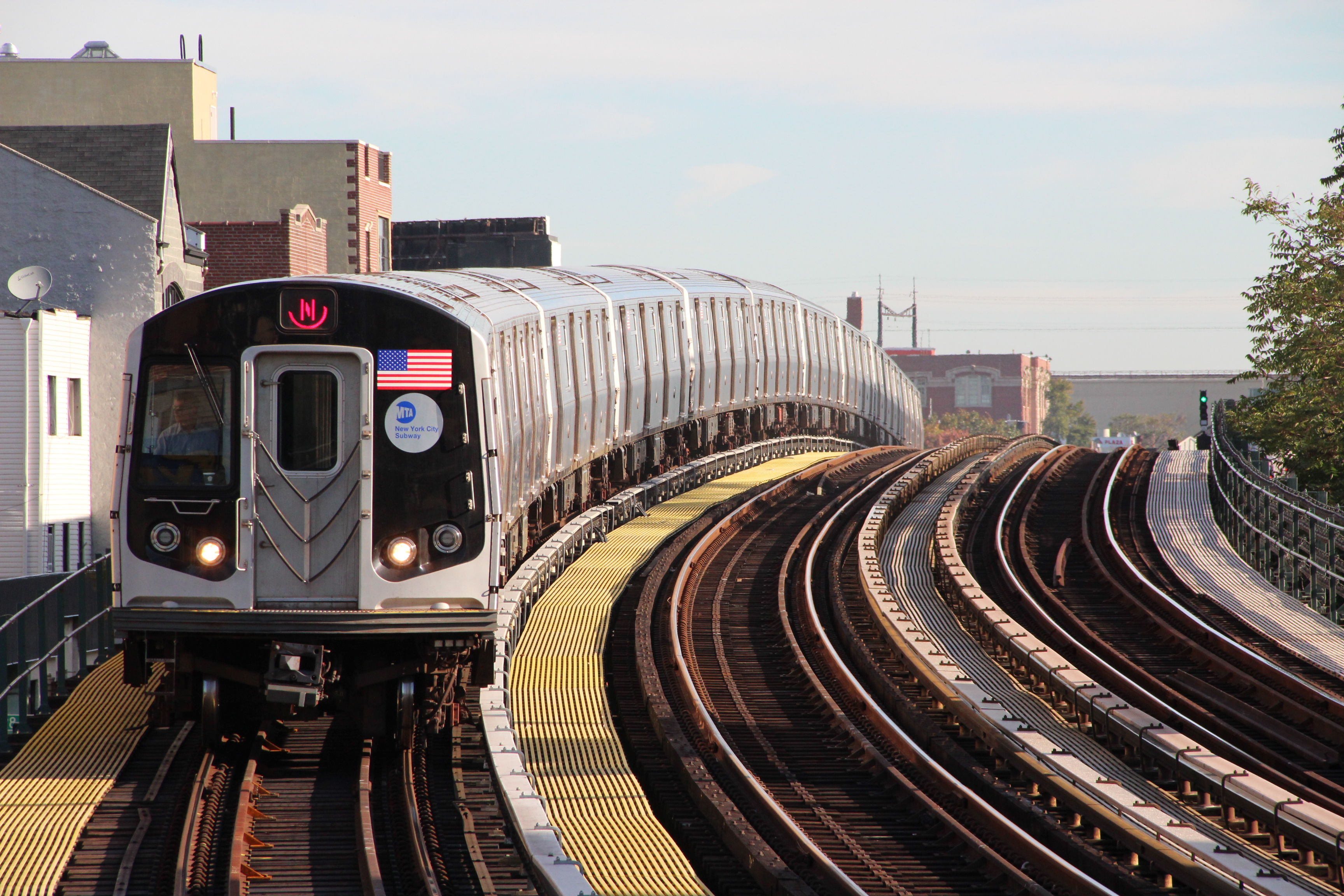 Subway by Niederkasseler